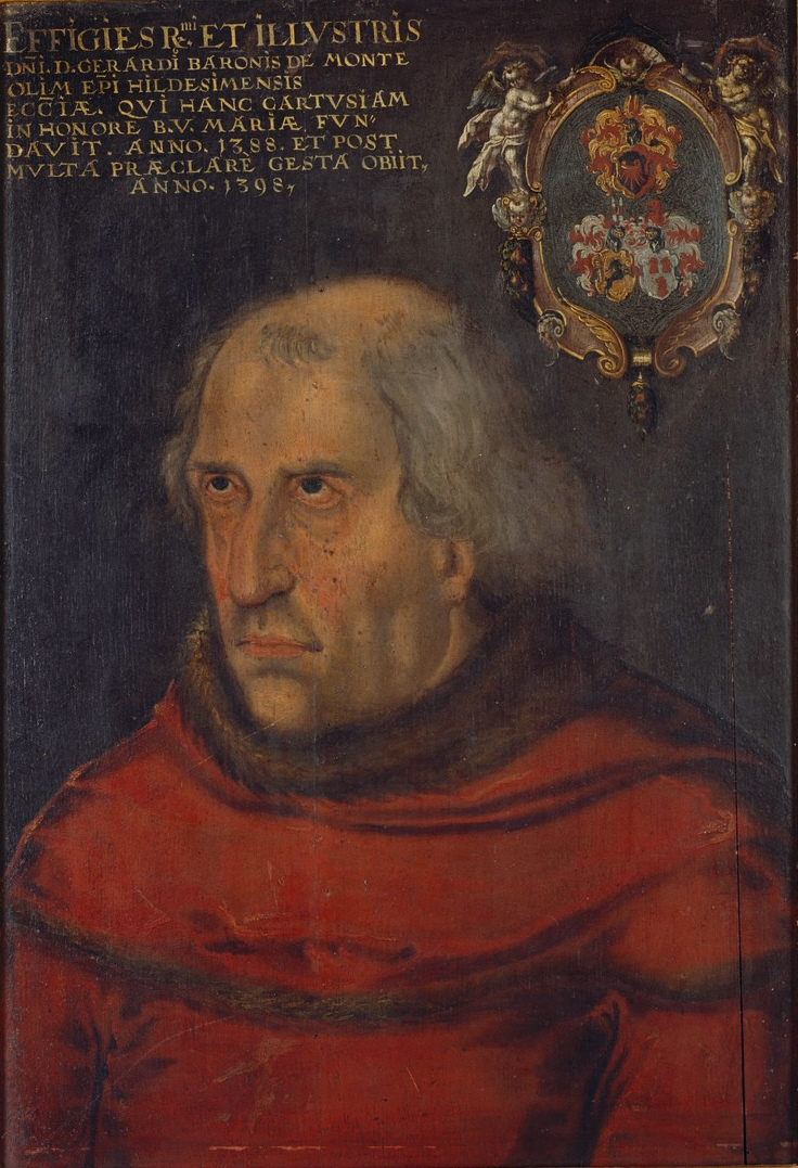 Bildnis des Bischofs Gerhard vom Berge, Dom-Museum Hildesheim